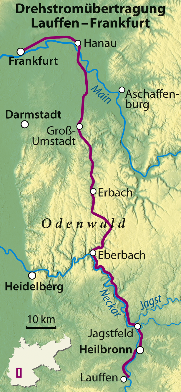 Verlauf der Drehstromübertragung Lauffen–Frankfurt